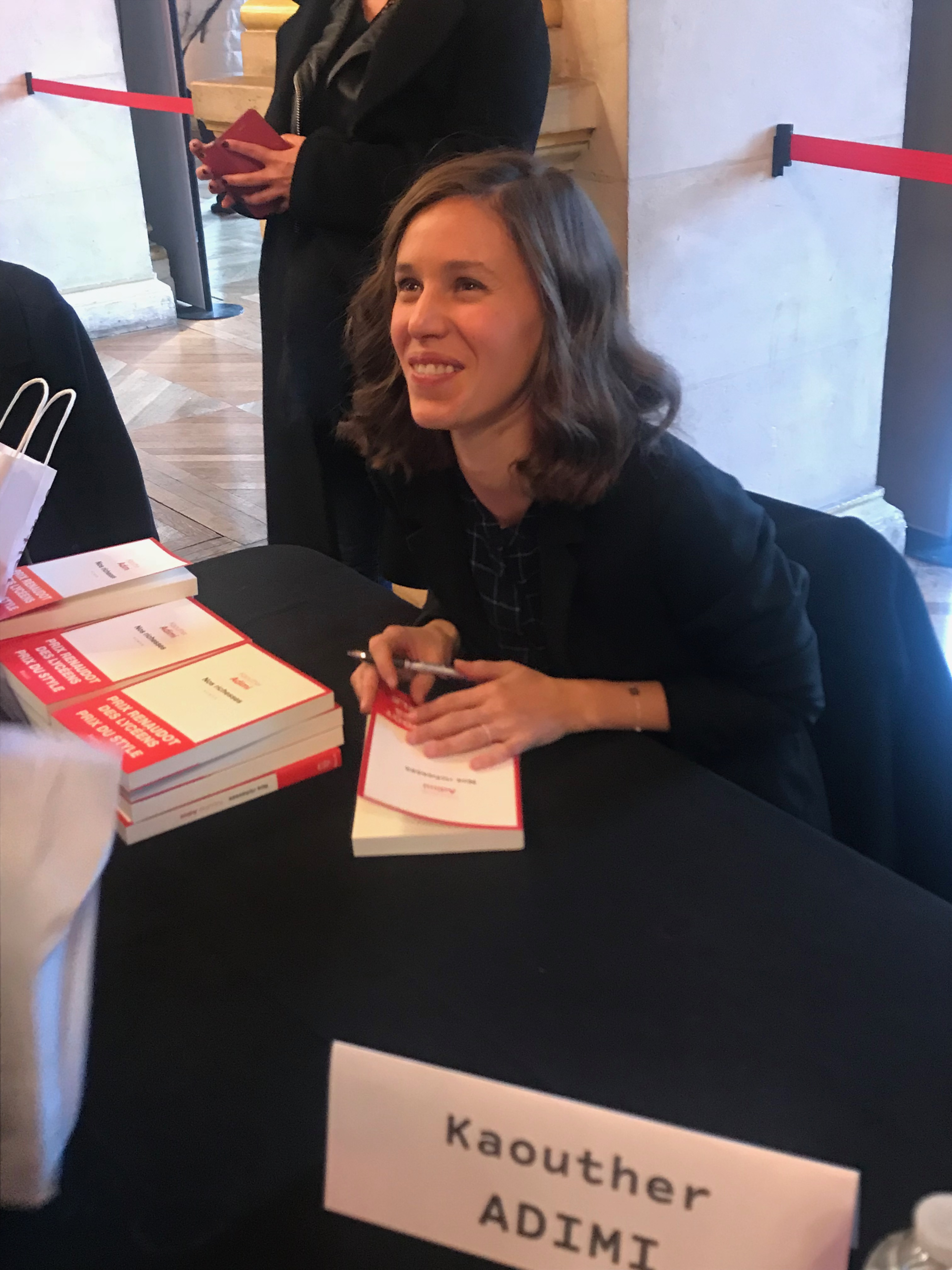 Kaouther Adimi, Maghreb-Orient des Livres, Paris, février 2018.